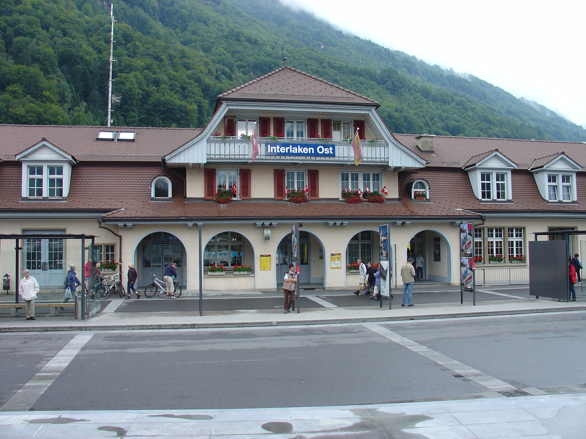 Berner Oberland-Bahn Interlaken Ost Station